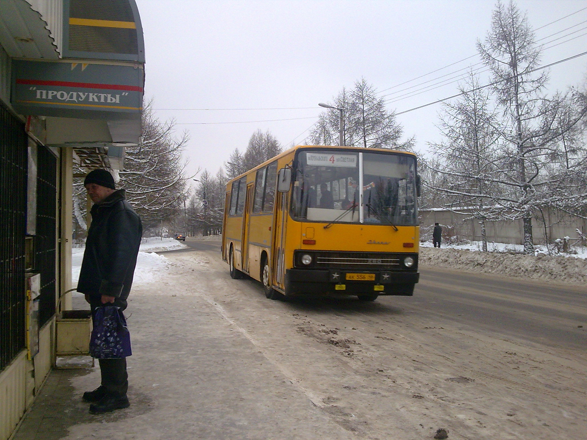 Автобус Ikarus 260 в Курске.